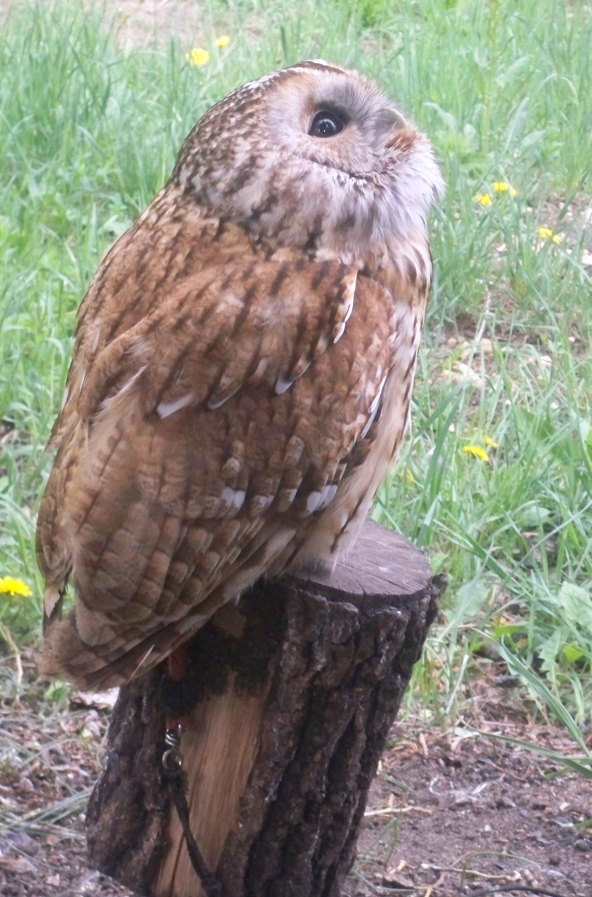 Липецкая область, заповедник "Галичья гора". Сова.